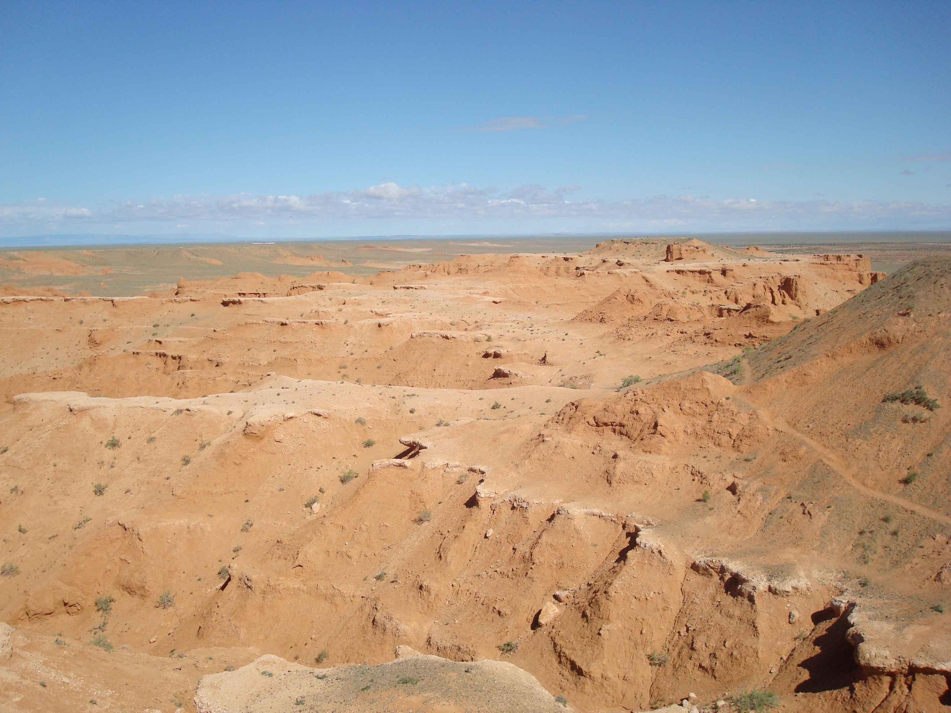 Bajandsag